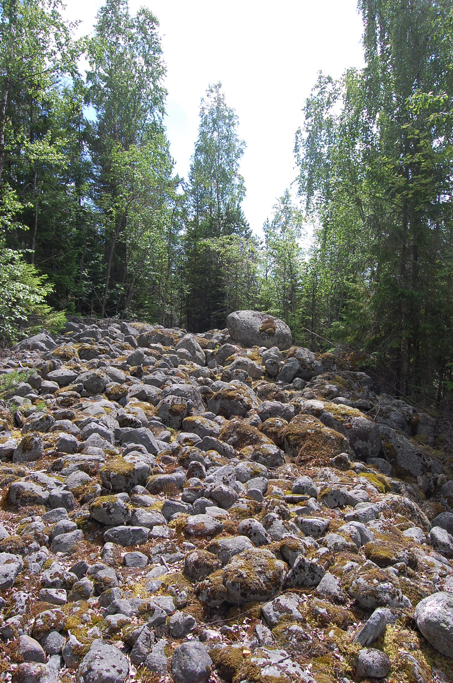 Mäntsälässä sijaitsevan Ullamäen drumliinin laella oleva pirunpelto.